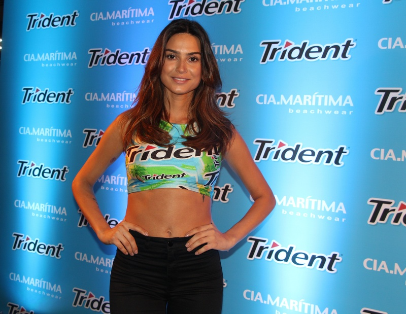 48 - Thayla Ayala-007